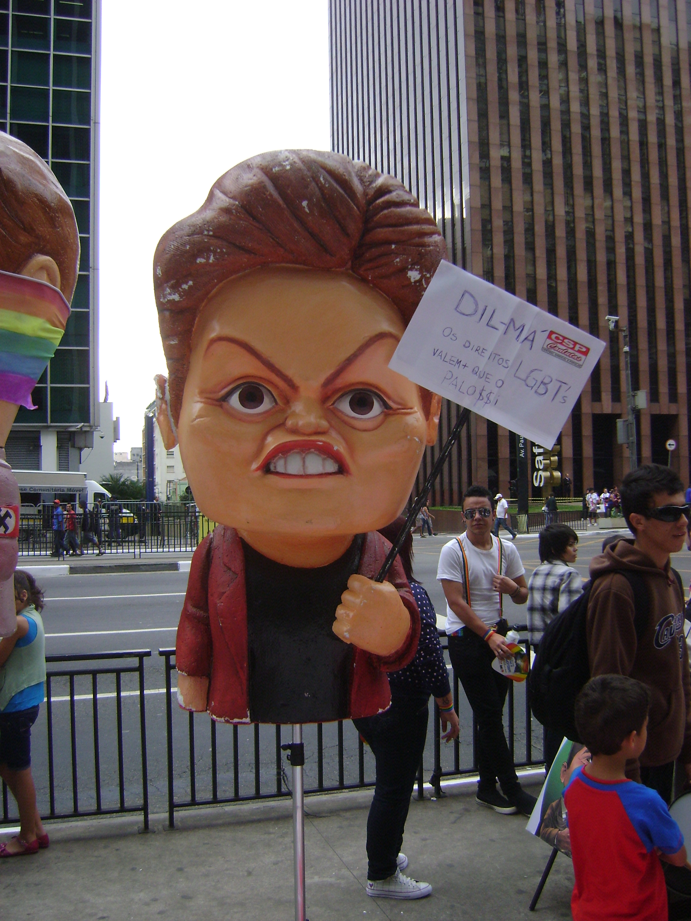 Boneco gigante da presidente Dilma Rousseff durante a Parada Gay de São Paulo, com um cartaz em protesto pelo veto ao kit anti-homofobia em troca da tentativa de manutenção do ex-ministro Palocci.